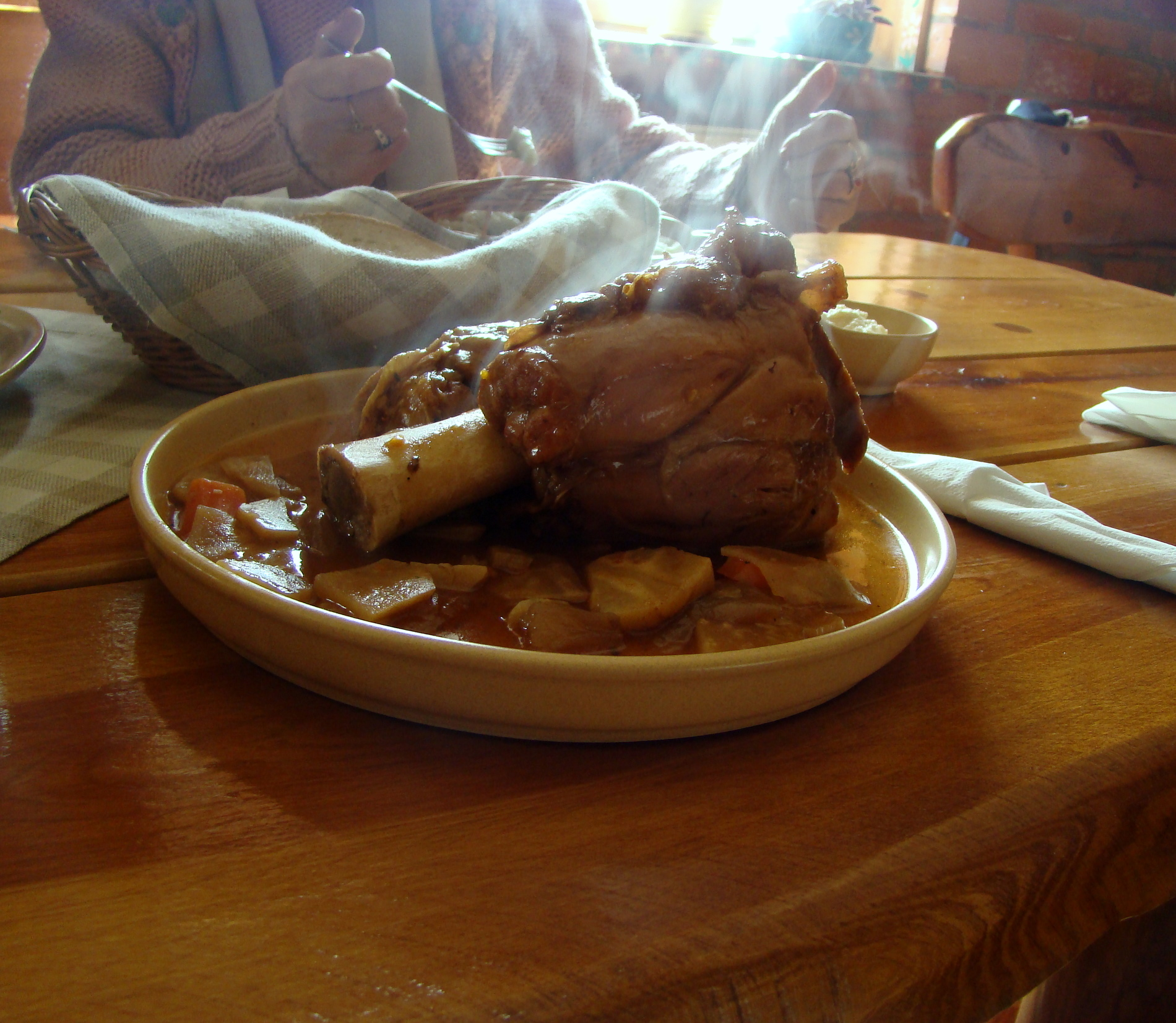 Gicz cielęca serwowana w gospodzie we wsi Będlewo w powiecie poznańskim